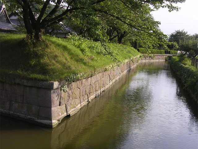 龍岡城 撮影者:Yosemite